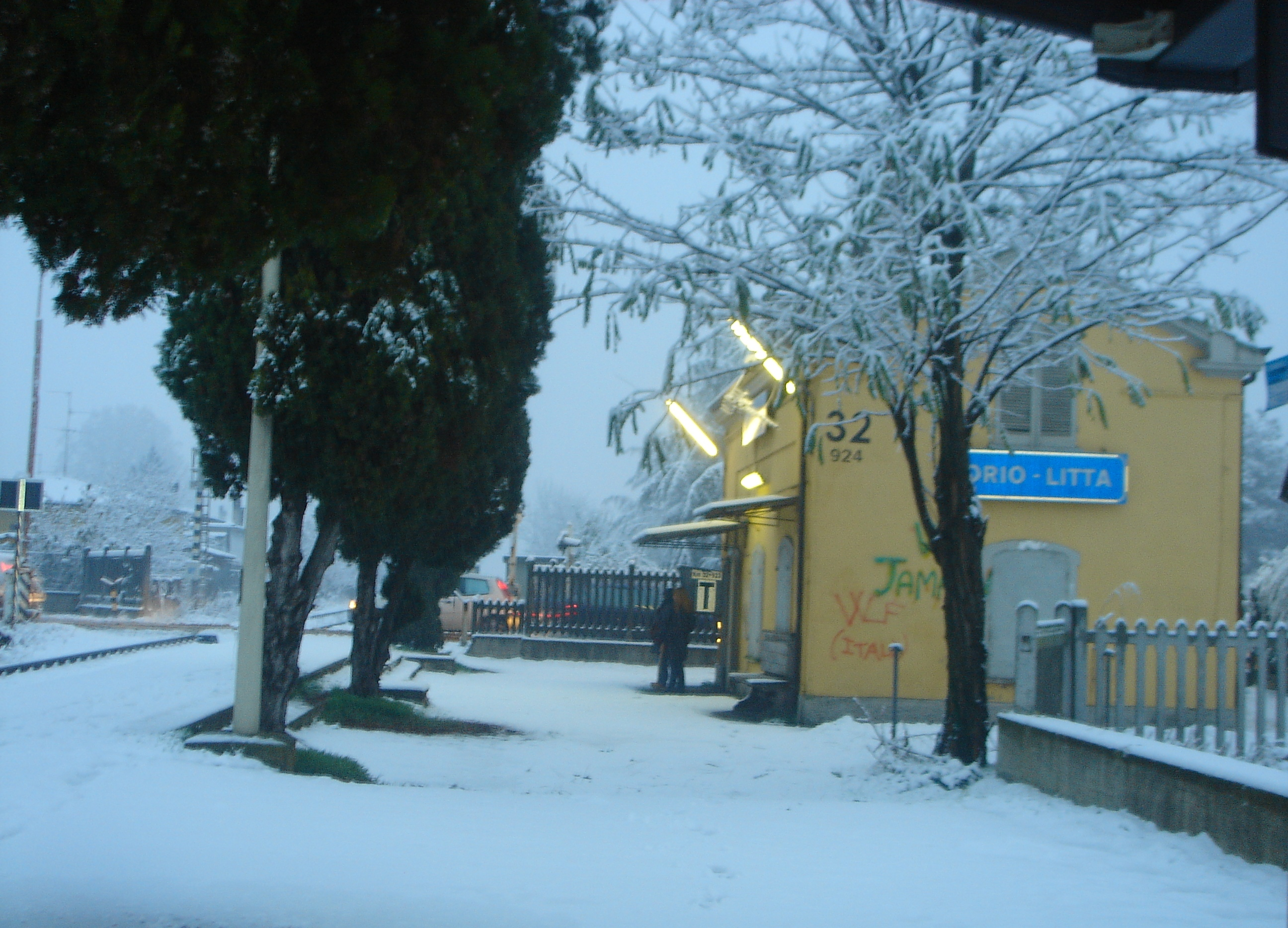 Foto scattata nel periodo natalizio nella stazione di Orio Litta (LO)